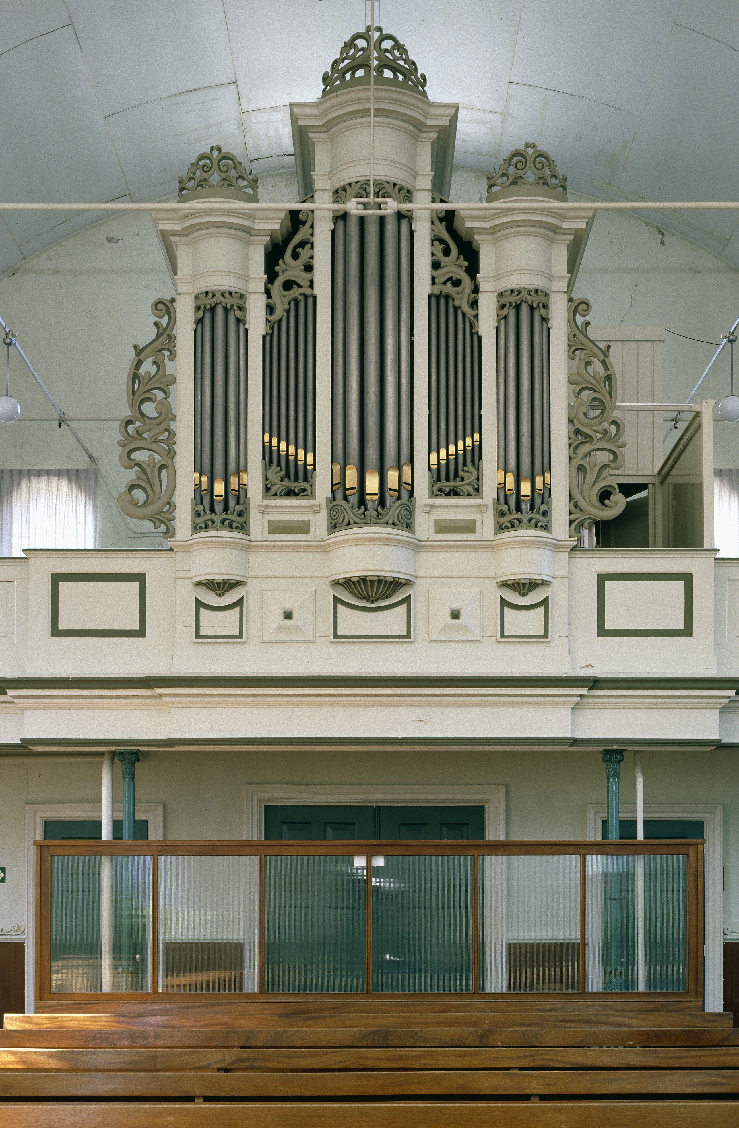 Arum, van Camminghaweg 13. Gereformeerde Kerk.: Interieur, aanzicht orgel, orgelnummer 1851 (opmerking: Gefotografeerd voor Het Historische Orgel in Nederland 1894-1901, bladzijde 32)